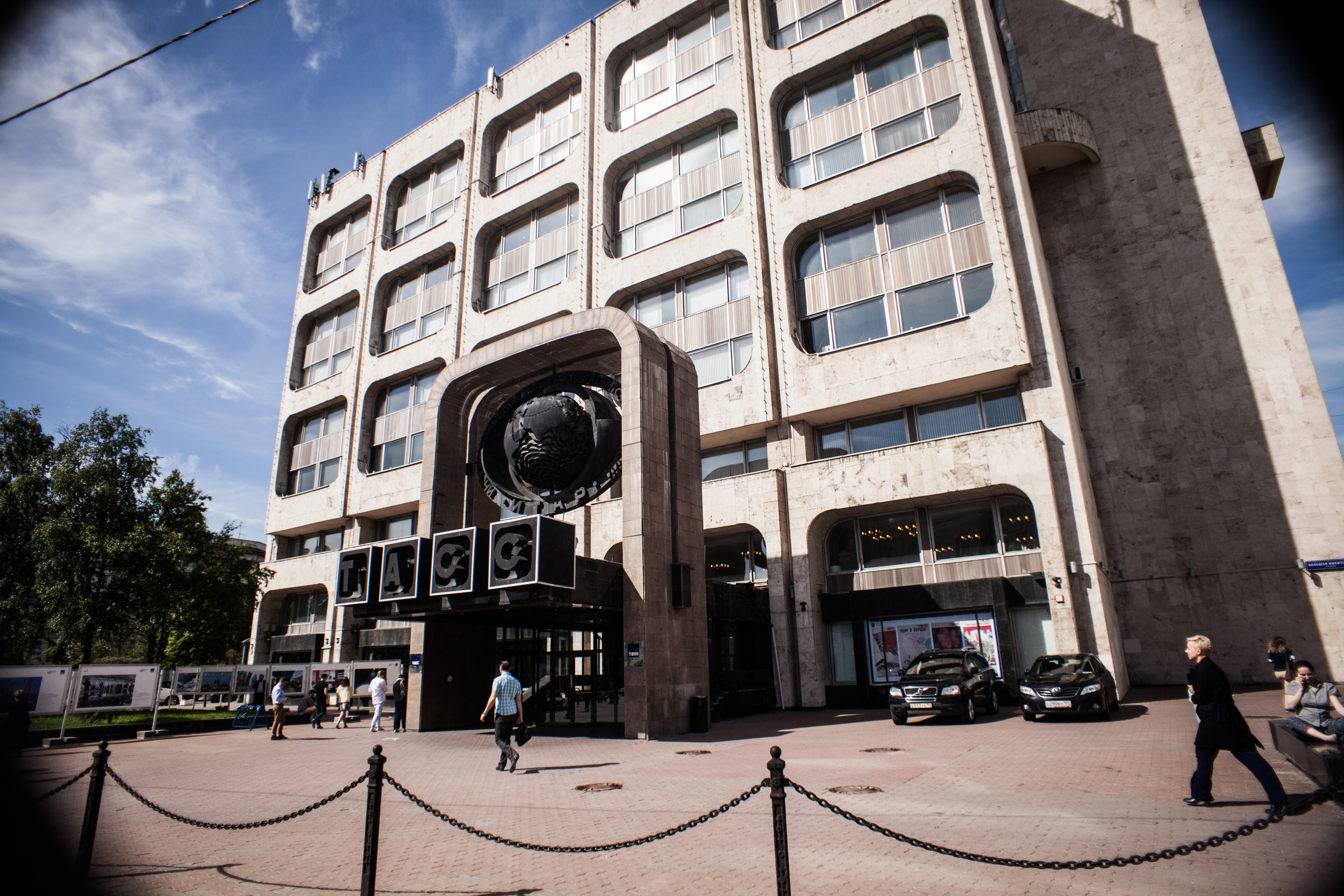 Здание ИТАР-ТАСС